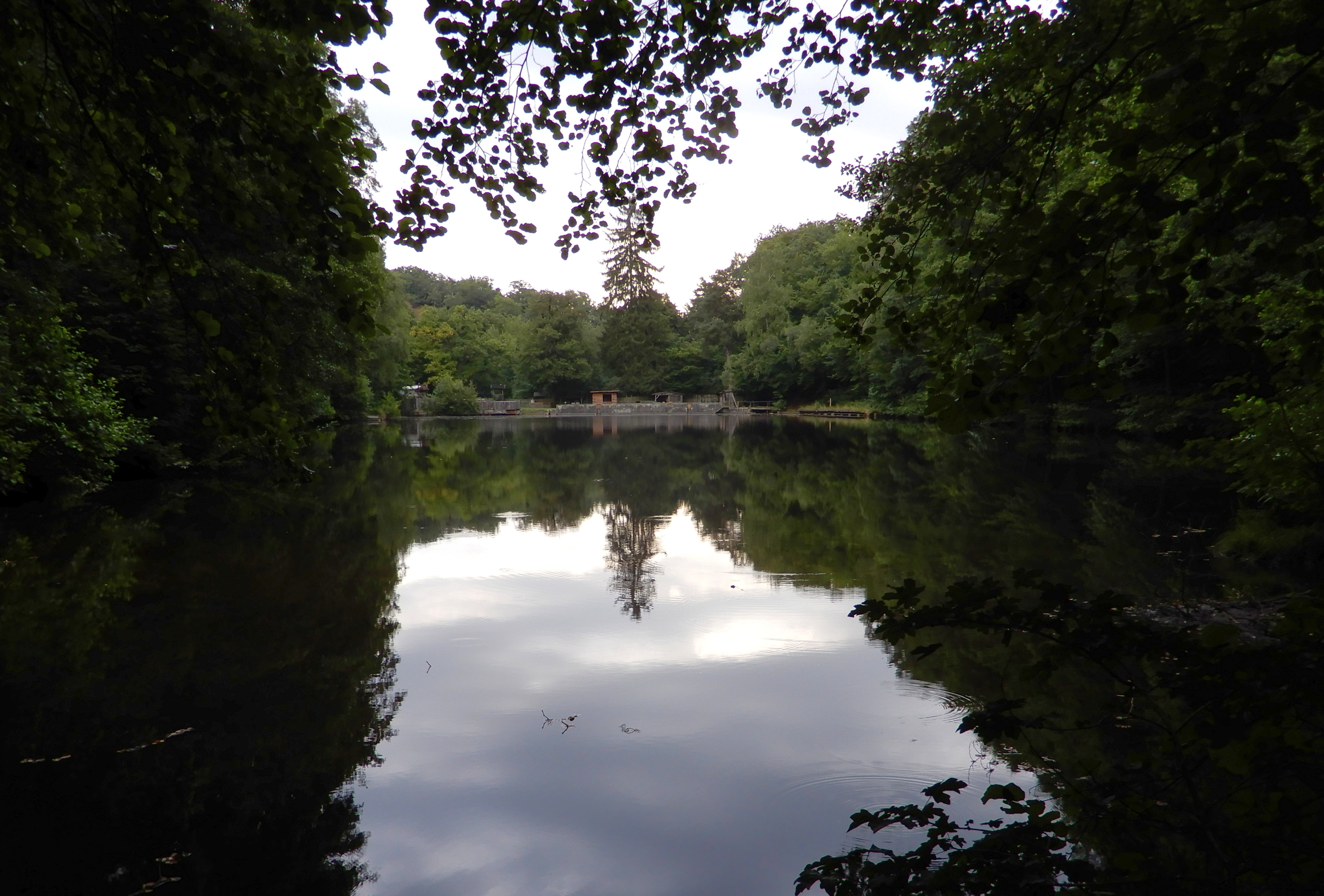 Hirschteich in Ballenstedt